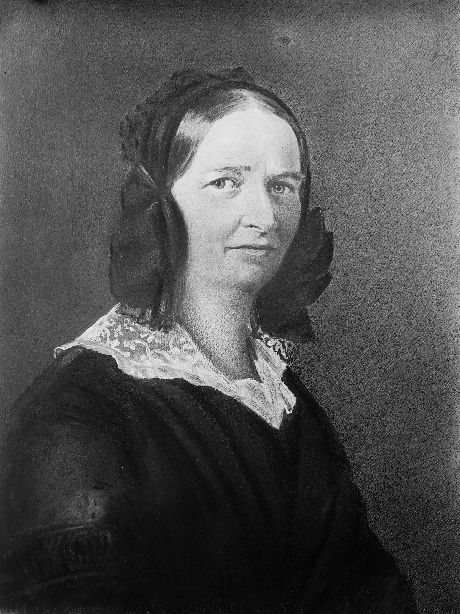 Friederike Kerner (1786–1854), die Ehefrau Justinus Kerners, in mittleren Jahren. Kreide- und Tuschzeichnung von Alexander Bruckmann, Fotografie von Wilhelm Kratt aus dem Jahr 1925 (ohne Rahmen)